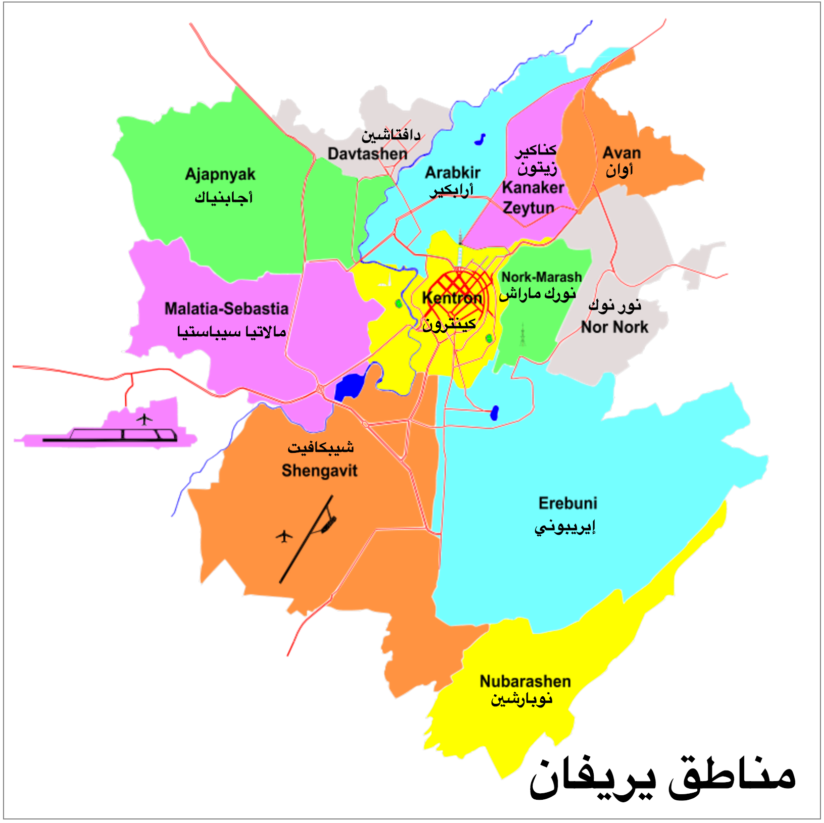 المناطق الإدارية لمدينة يريفان